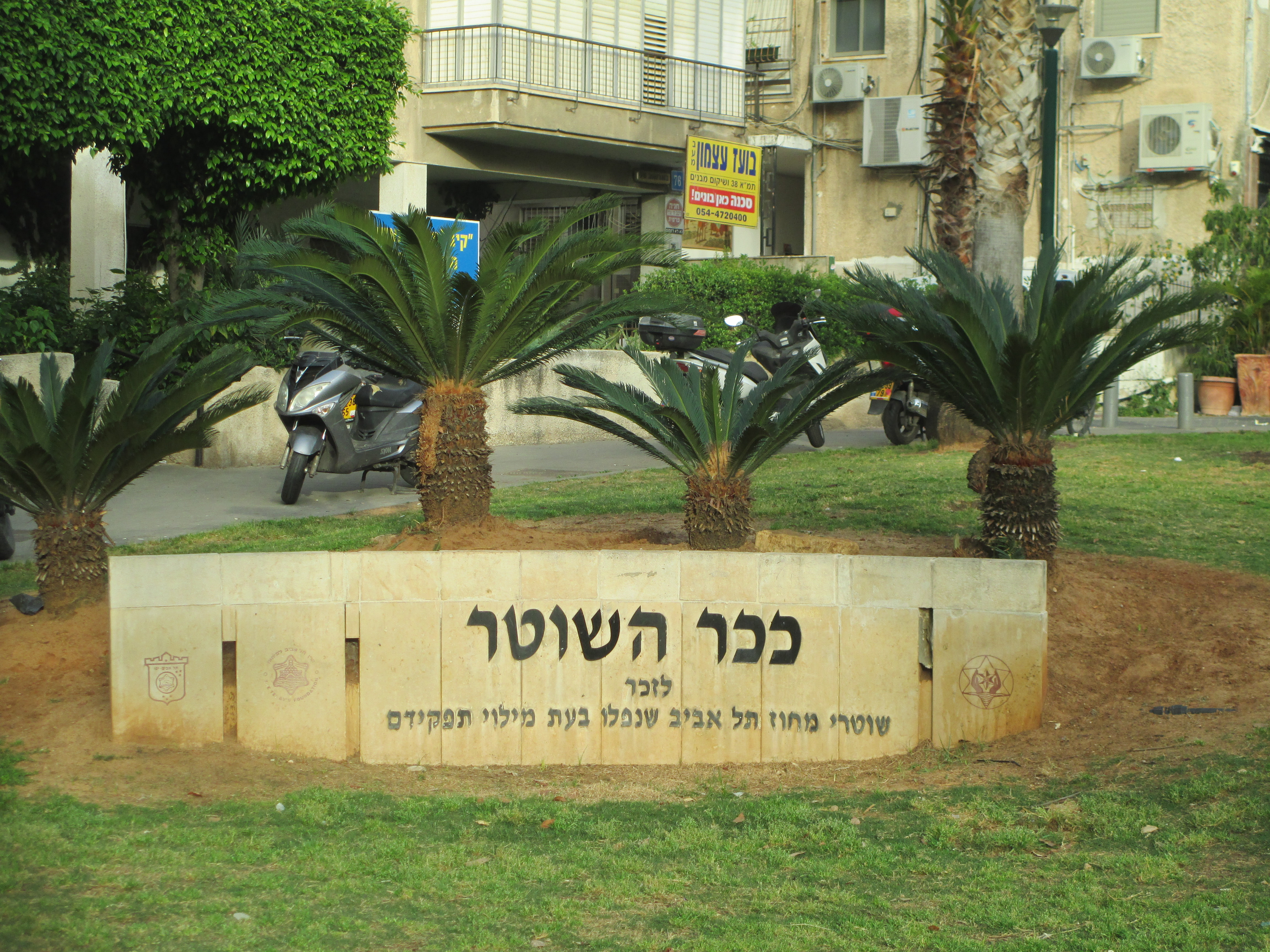 כיכר השוטר בתל אביב